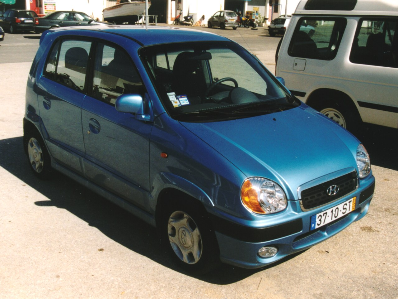 Quelle: Harald H. Linz Fotograf: Harald H. Linz Mit Genehmigung von Harald. H. Linz für Wiki eingestellt.